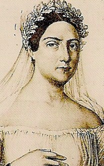 Retrat de la cantant barcelonina Giovanna Rossi-Caccia que cantà al Liceu les tres primeres temporades